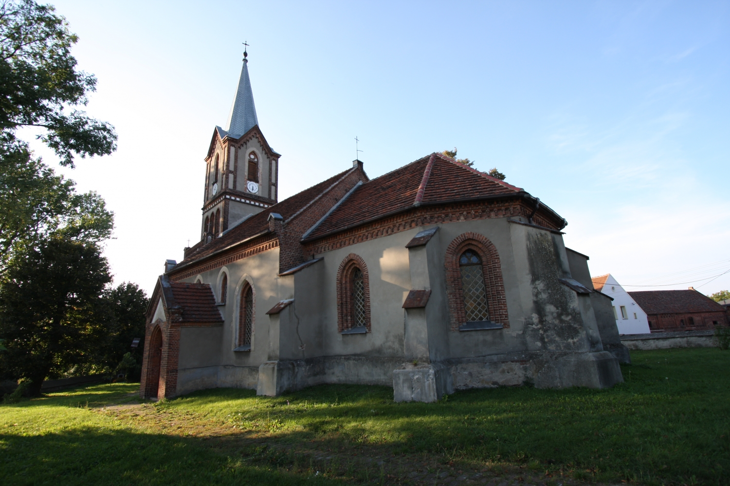 Glińsk, kościół fil. p.w. św. Józefa, mur., XVI, 1876-1883